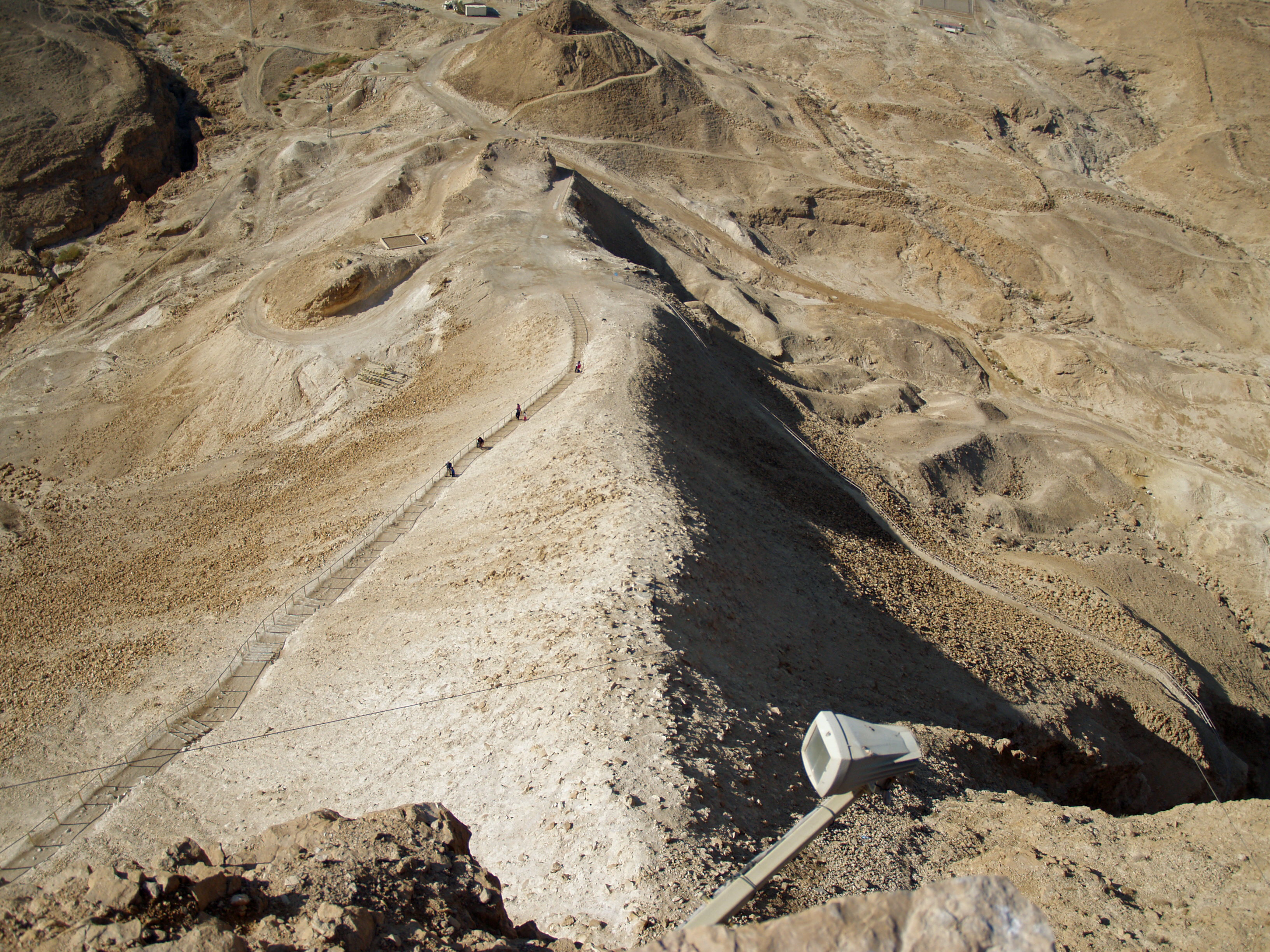 Masada Roman Ramp